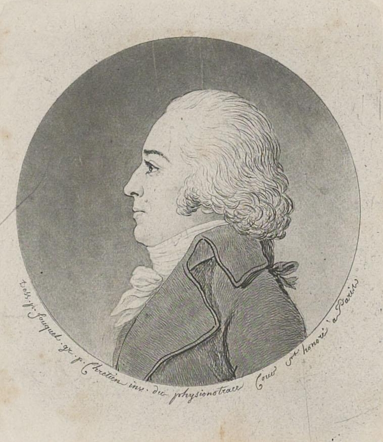 Quint Ondaatje